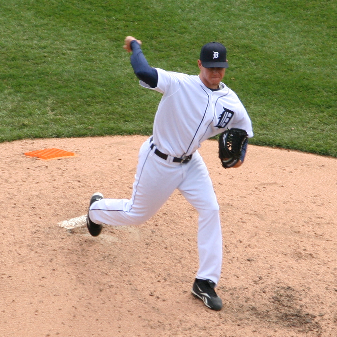 Ryan Perry